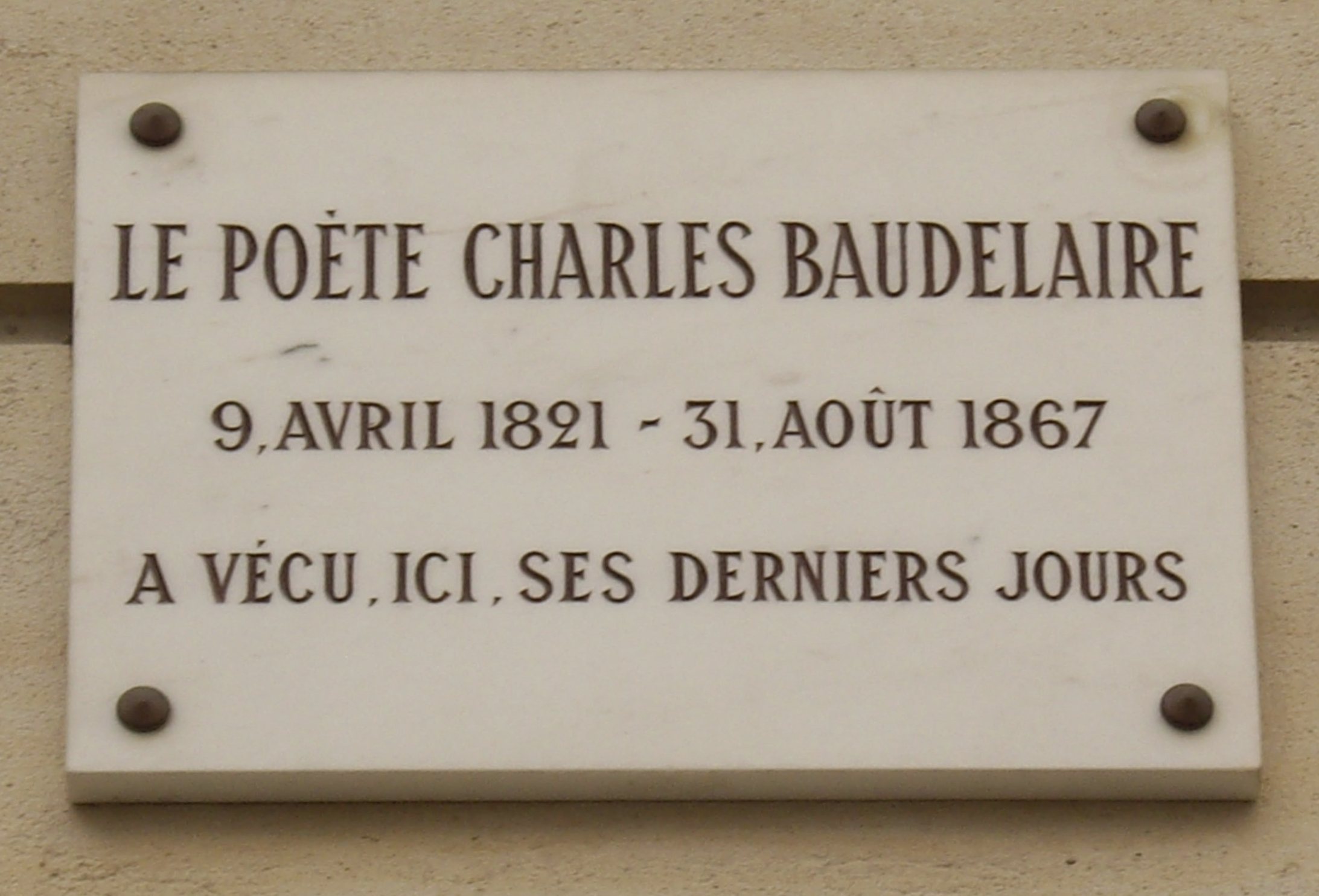 Plaque commémorative, 1 rue du Dôme, anciennement maison de santé du docteur Duval, Paris 16e. « Le poète Charles Baudelaire, 9 avril 1821 — 31 août 1867, a vécu, ici, ses derniers jours. »